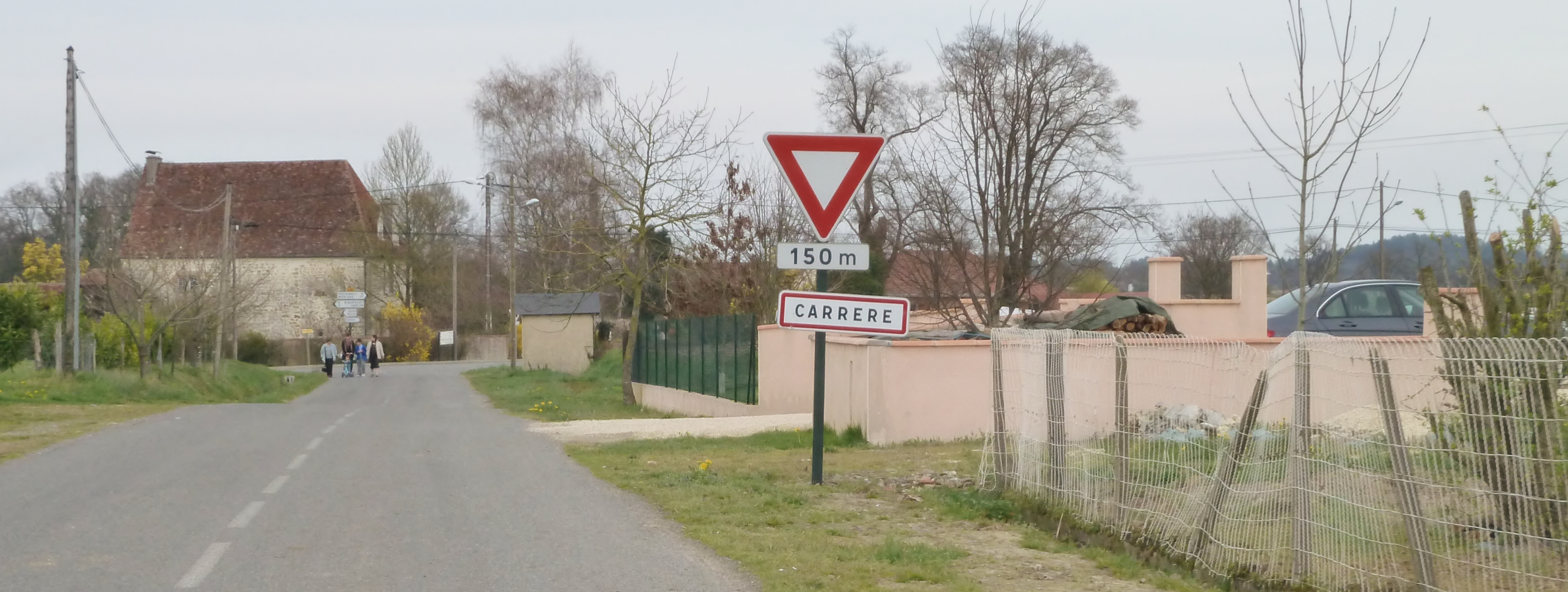 Entrée dans Carrère (Pyrénées-Atlantiques)